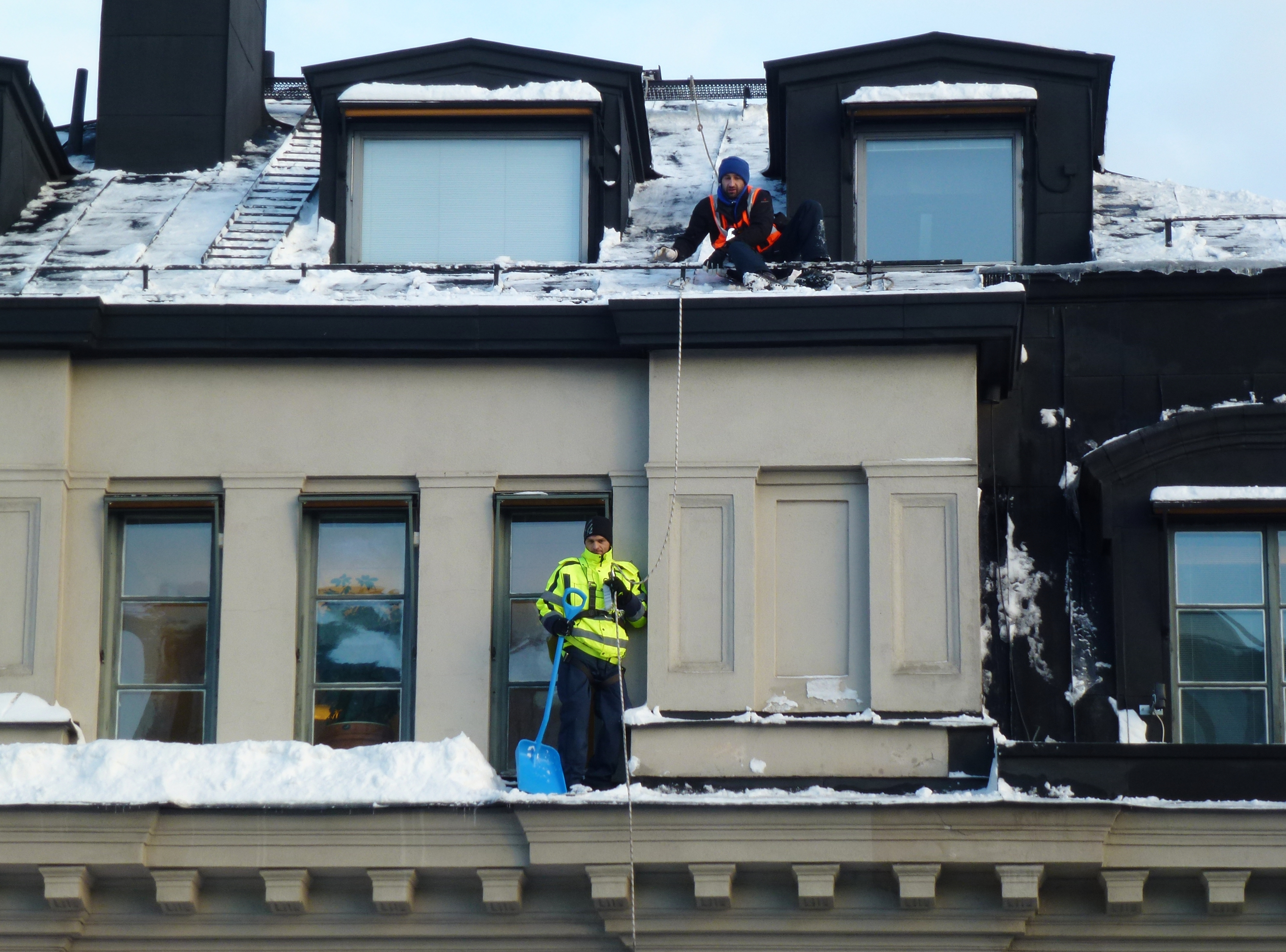 Stockholms central takskottning